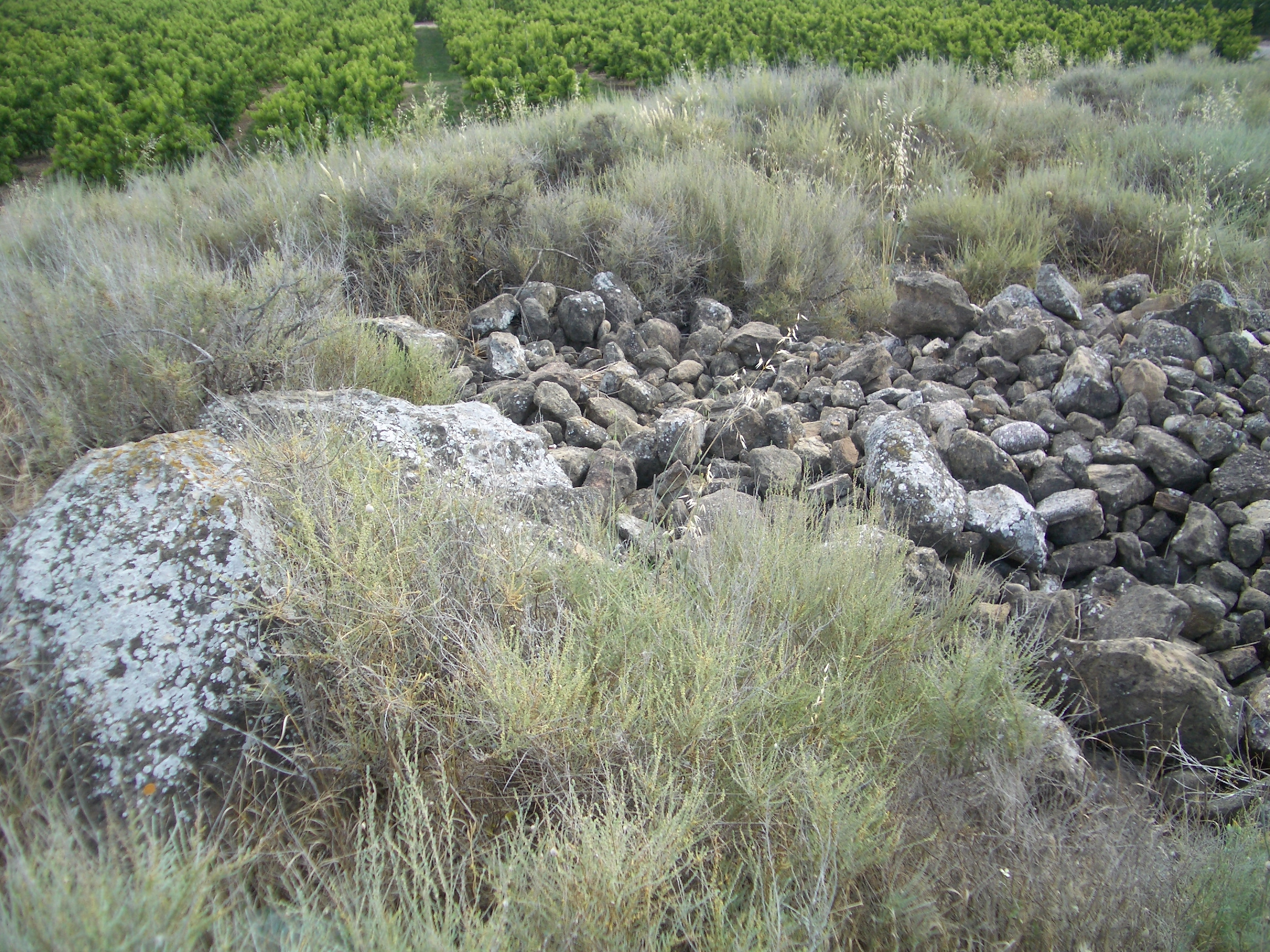 Vista de les restes de la construcció.